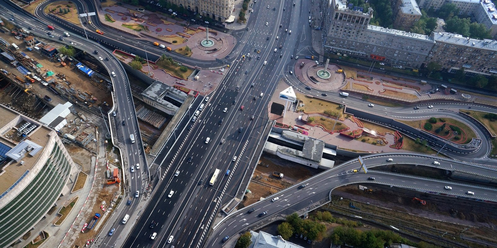 Развязка Кутузовского проспекта и ТТК, Можайский путепровод